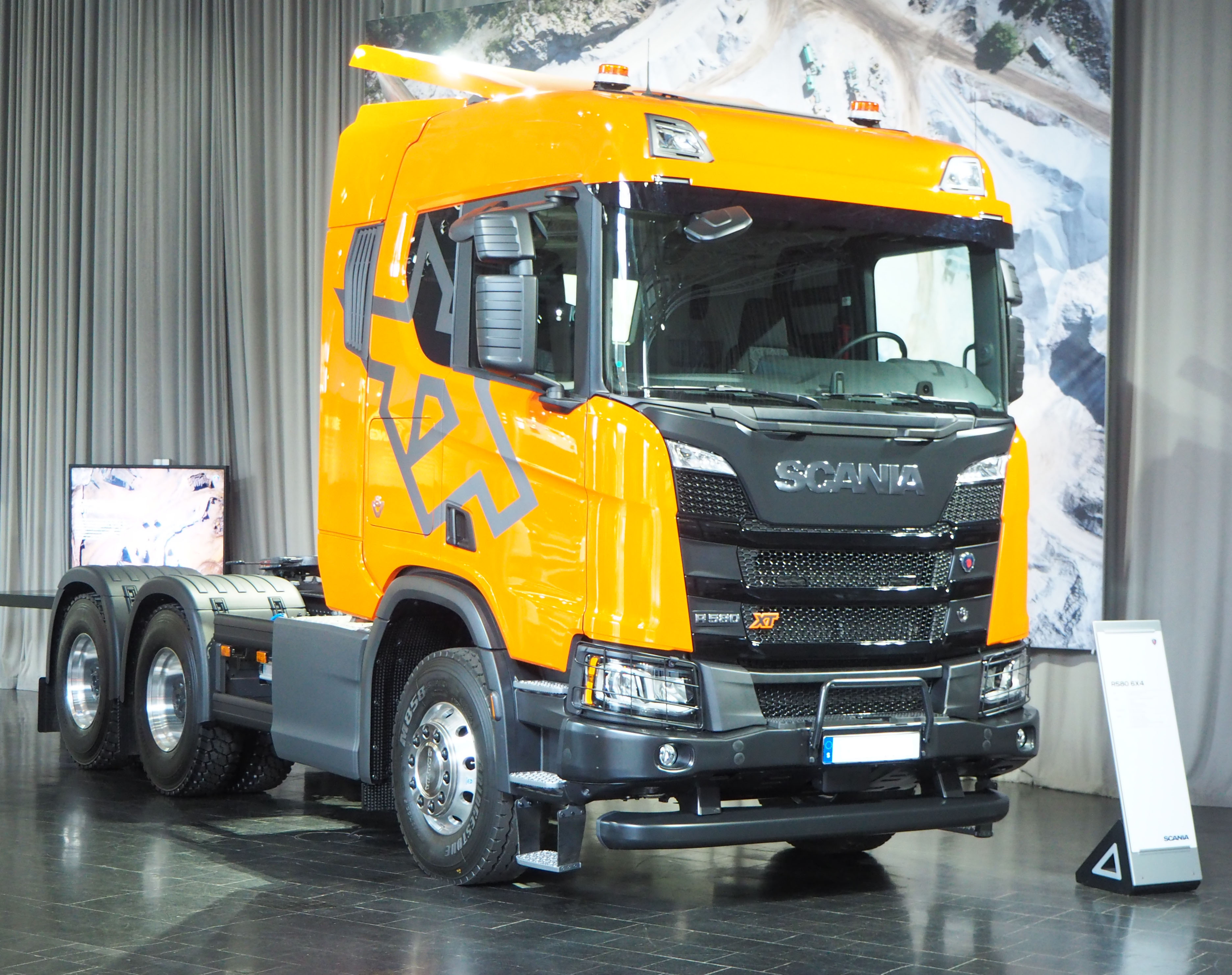 2018 Scania R580 XT